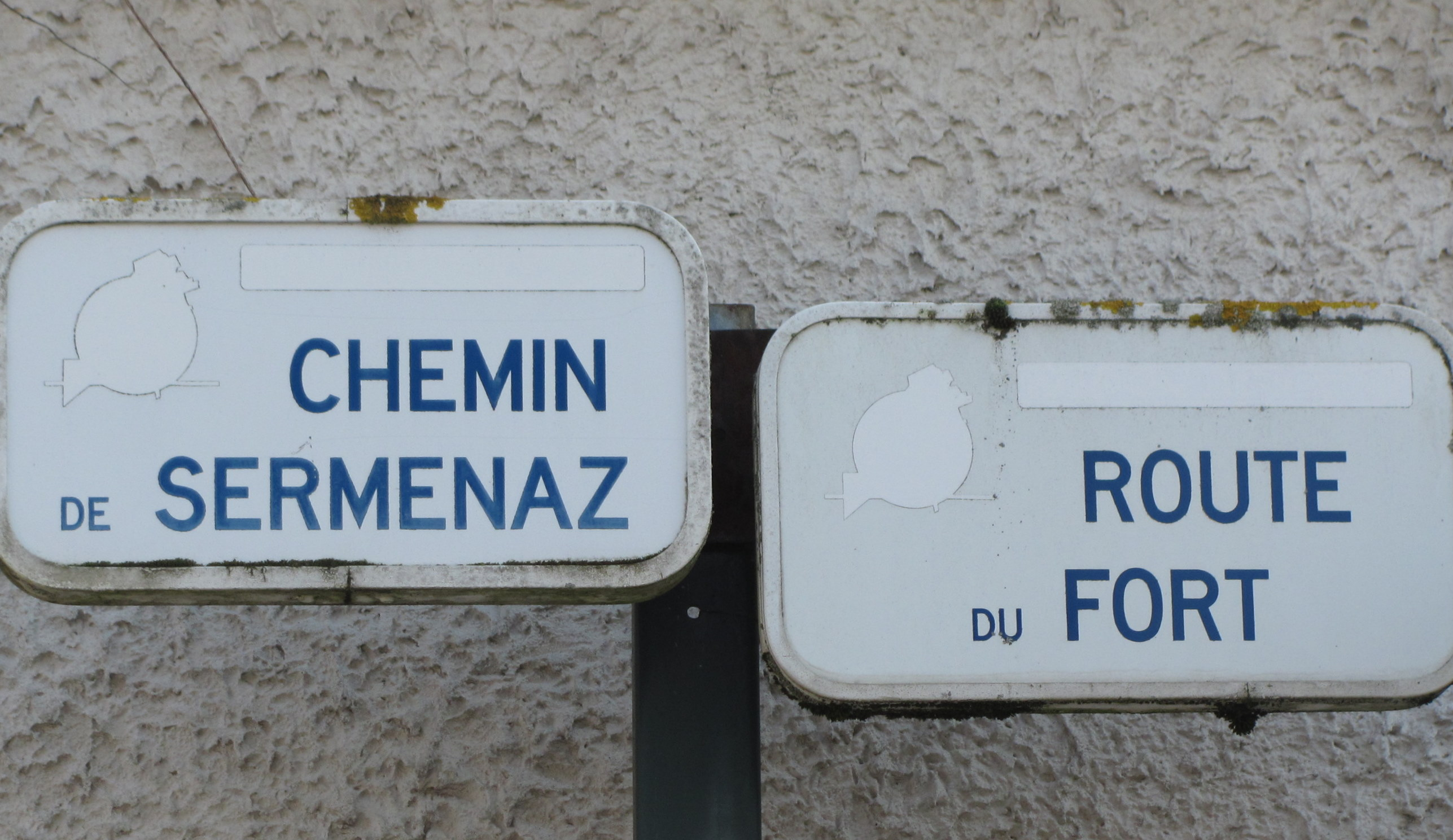 Chemin de Sermenaz et route du fort.